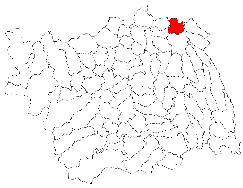 Categorie:Hărţi ale judeţului Bacău